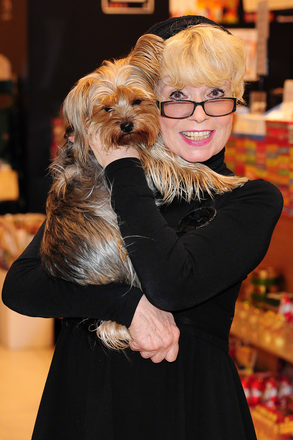 Ingrid Steeger mit ihrer Yorkshireterrier-Hündin Eliza Doolittle nach der Vorstellung ihrer Autobiografie am 18. November 2013 in Düsseldorf.